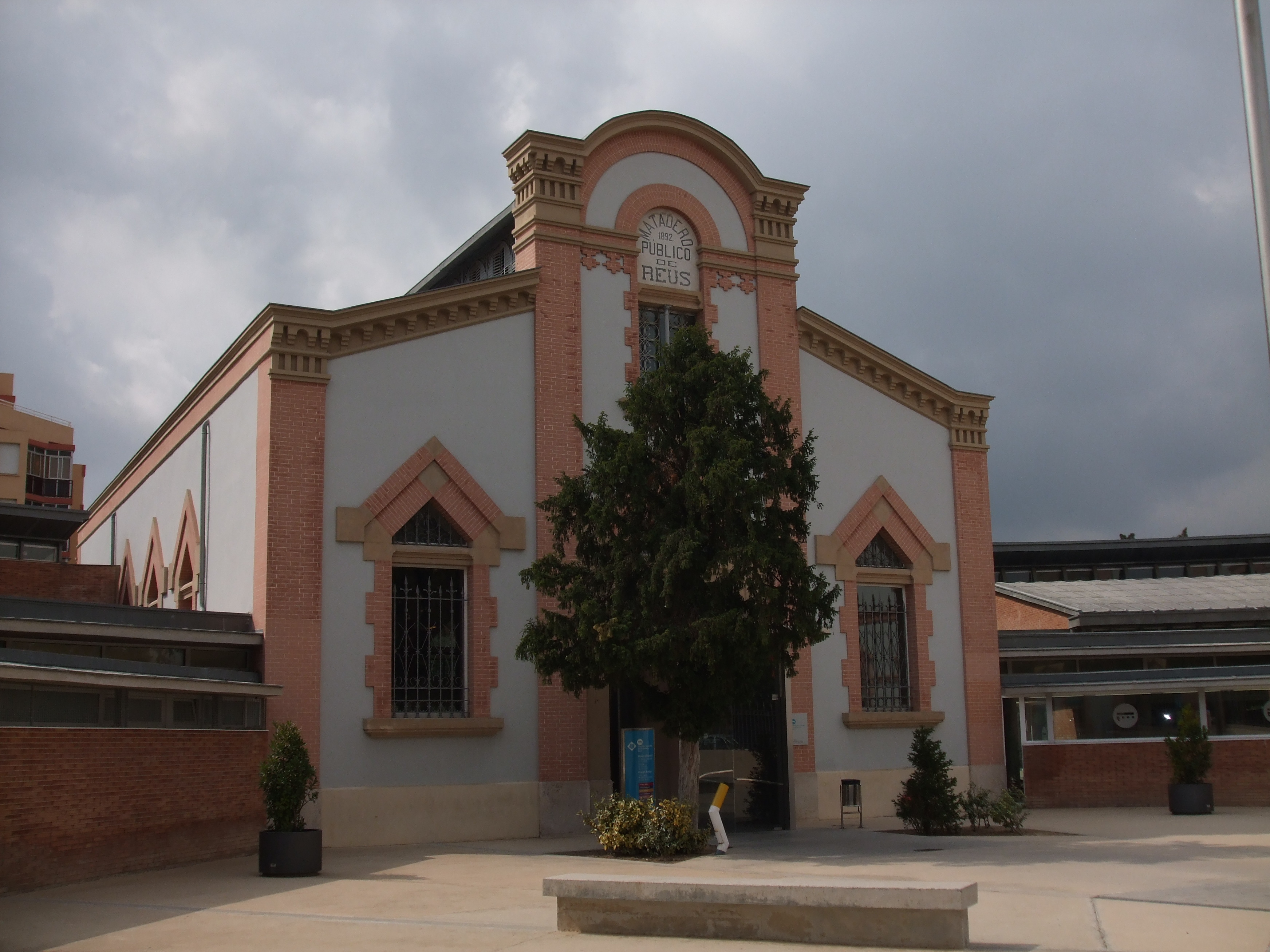 Biblioteca Xavier Amorós en Reus